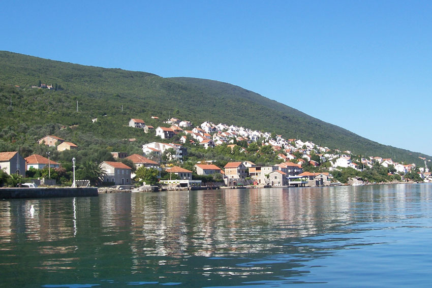 Панорама Крашића - у првом плану је амбијентална целина Крашићи, а у другом, новосаграђени објекти летовалишта (Васо Стањевић)